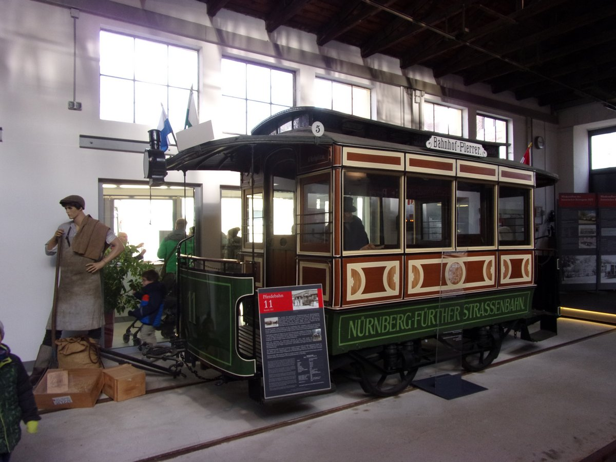 Pferdebahnwagen Nr. 11 der Nürnberg-Fürther Straßenbahn im Historischen Straßenbahndepot St. Peter